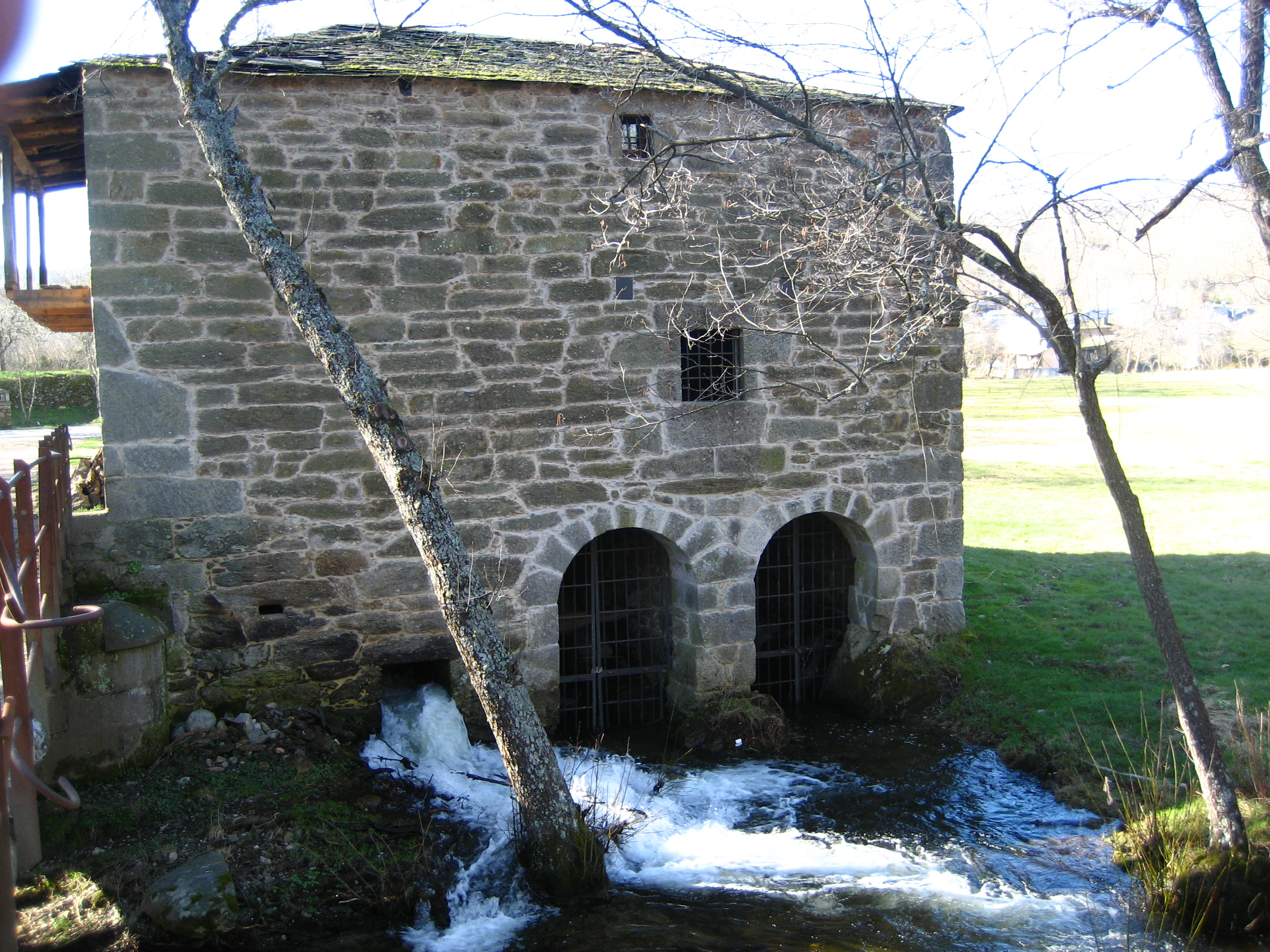 Molino de La Puente en la Yensula de Galende.